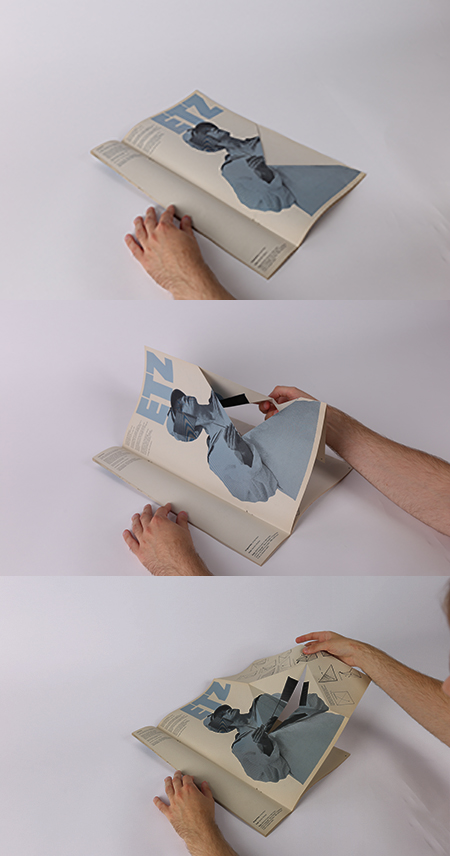 OETZ 15 Falttechnik, ewlche durch handarbeit bei allen 800 Ausgaben erstellt wurde